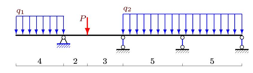 Неразрезная балка